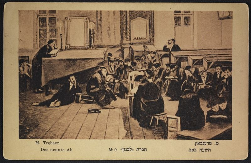 גלויה של הצייר היהודי-פולני מאוריצי טרבץ'. הופקה בתוך סדרת מאה הגלויות הראשונות של חברת "לבנון", מוסקבה, בשנת 1903, ונדפסה בעיר ורשה.אוסף התצלומים, הספרייה הלאומית